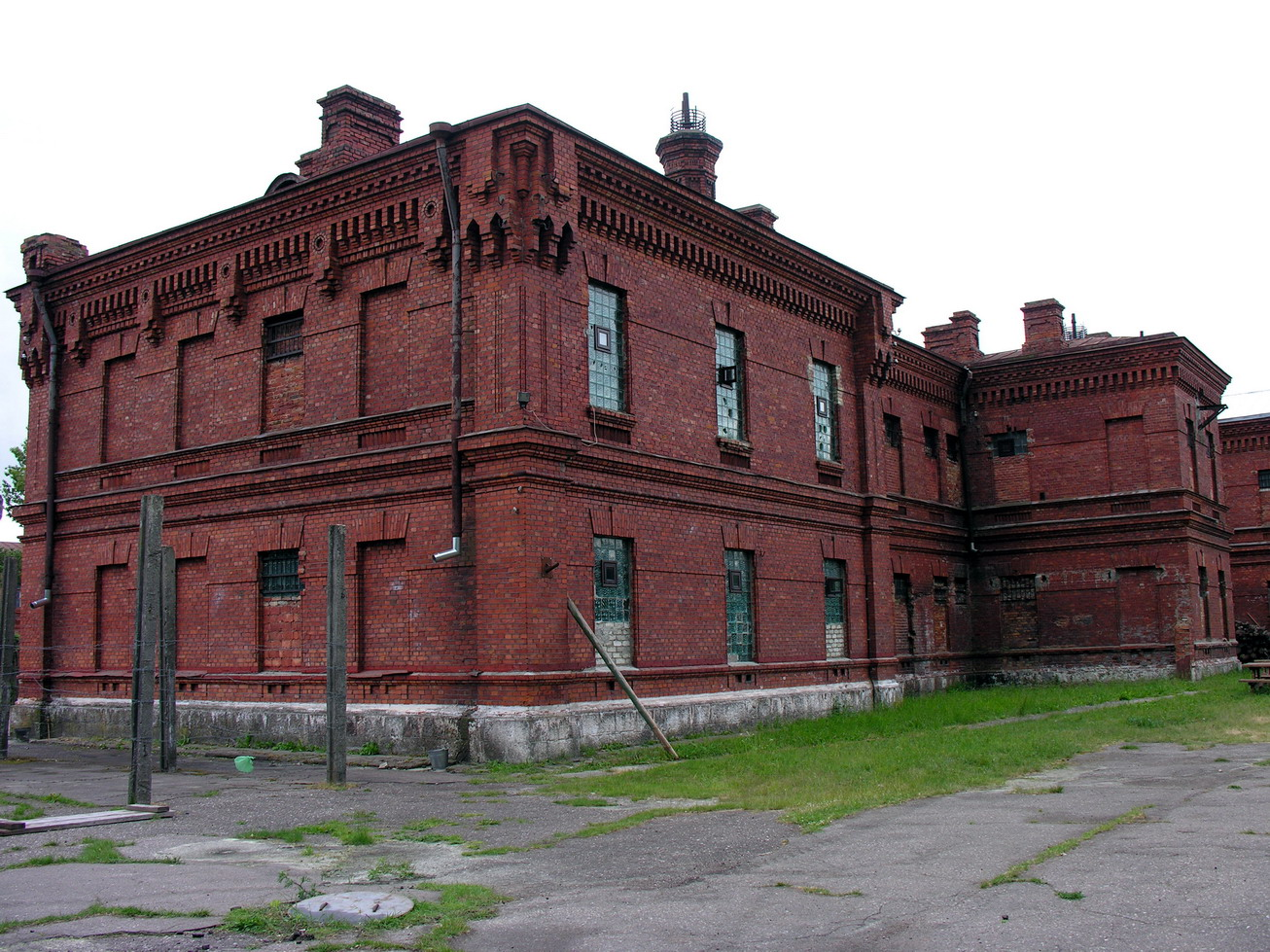 Liepojos Karo uosto kalėjimas